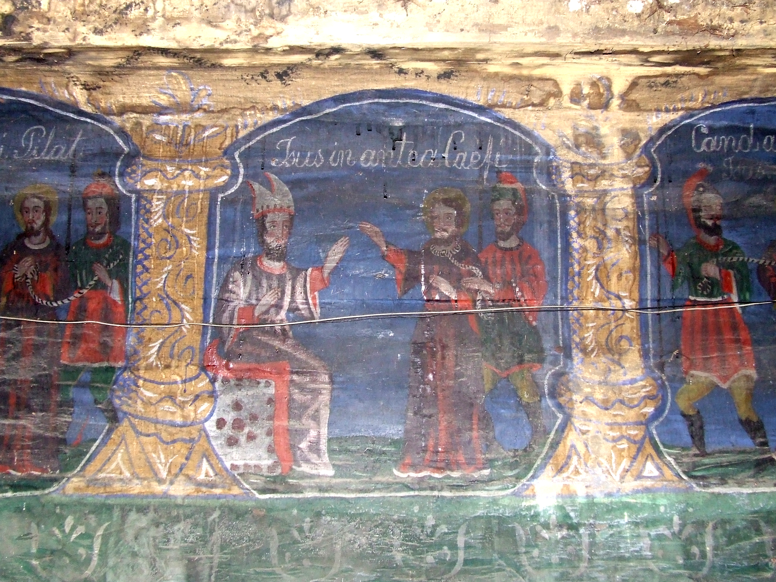 Bucea